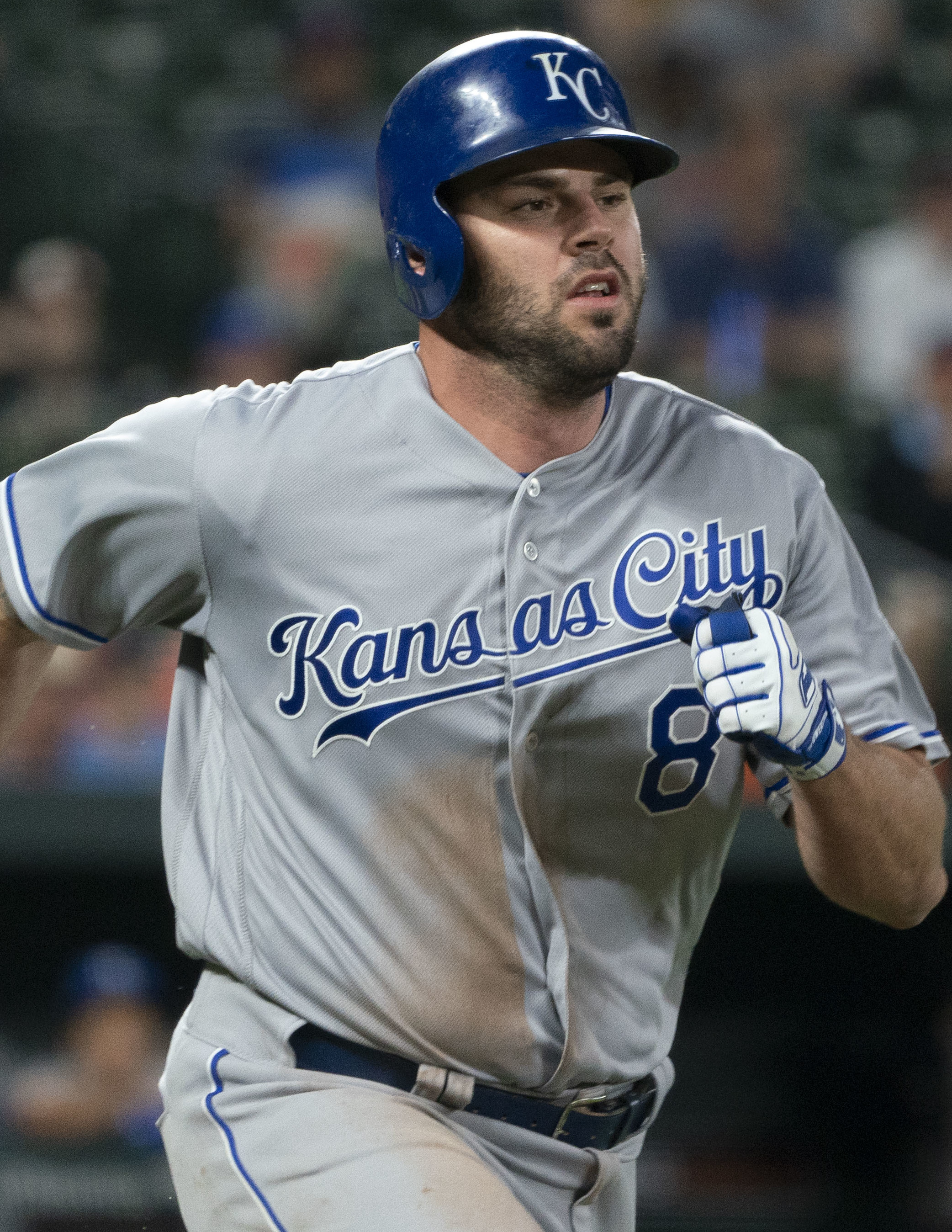 Royals at Orioles 5/9/18